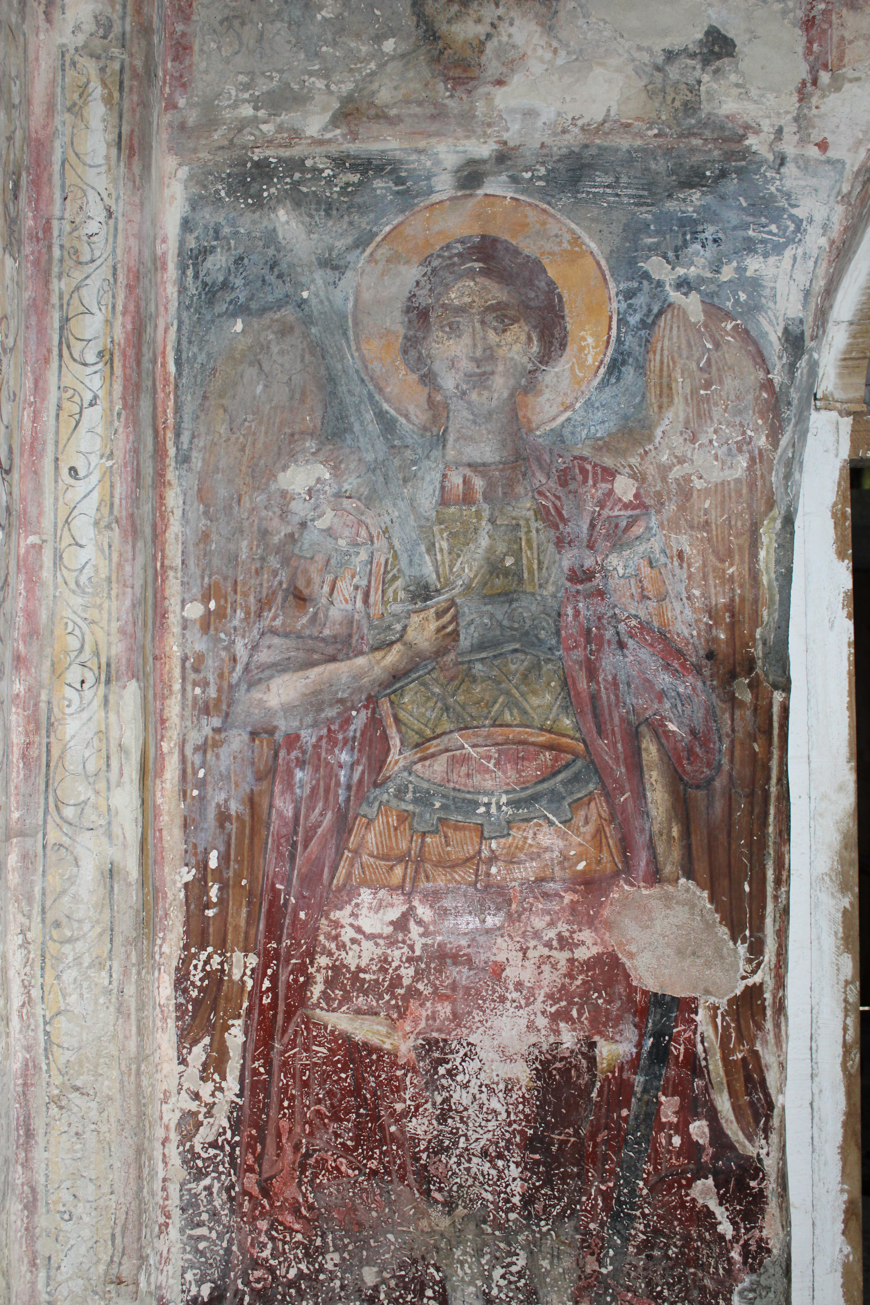 ჯუმათის ეკლესია